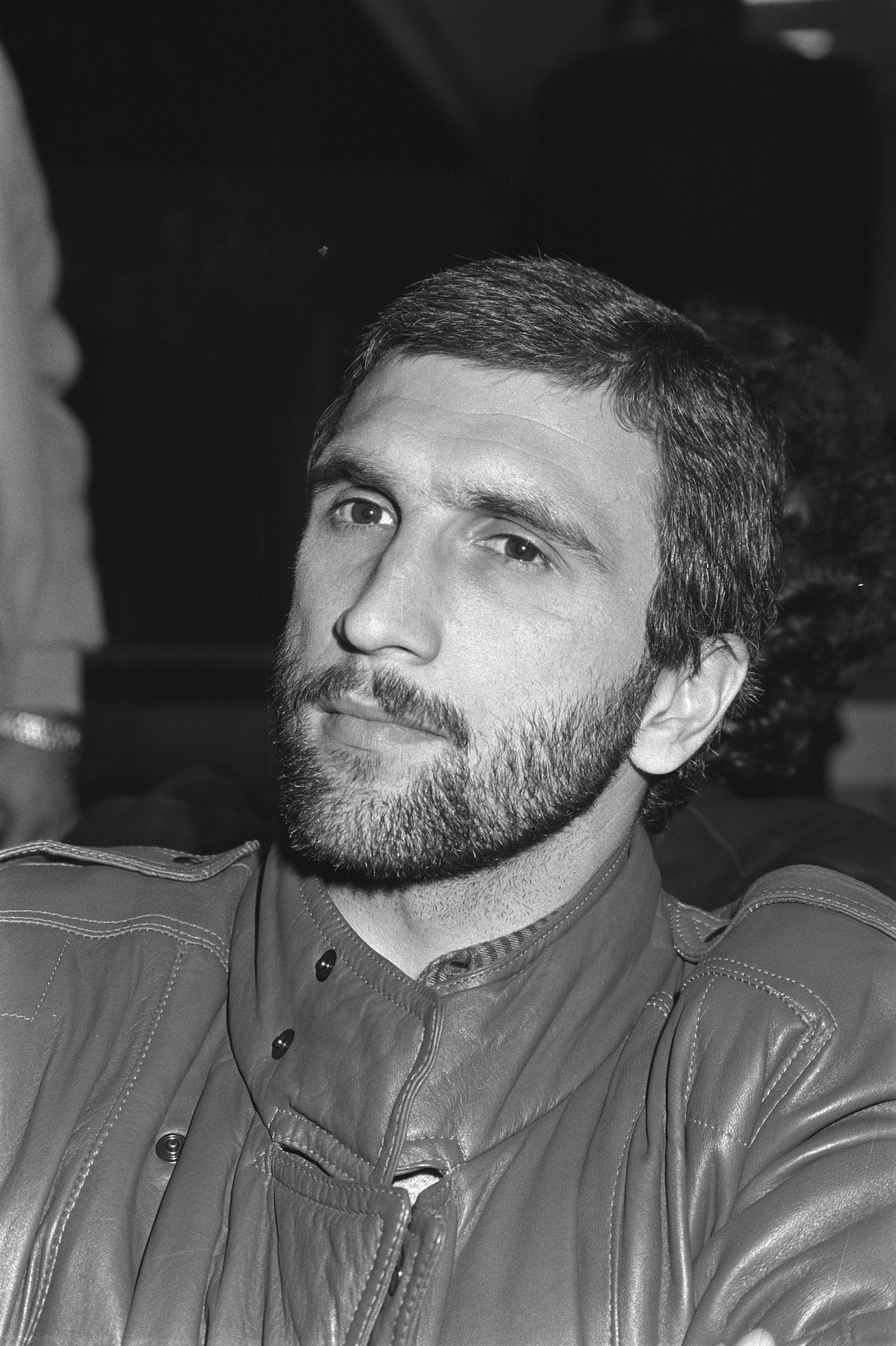 Collectie / Archief : Fotocollectie Anefo Reportage / Serie : Aankomst voetbalploeg Rapid Wien in verband met wedstrijd tegen PSV Beschrijving : Sterspeler Hans Krankl Datum : 2 november 1981 Trefwoorden : portretten, sport, voetballers Persoonsnaam : Krankl, Hans Instellingsnaam : Rapid Wien Fotograaf : Dijk, Hans van / Anefo Auteursrechthebbende : Nationaal Archief Materiaalsoort : Negatief (zwart/wit) Nummer archiefinventaris : bekijk toegang 2.24.01.05 Bestanddeelnummer : 931-7809